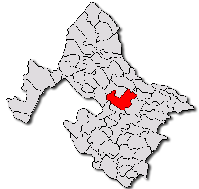 Categorie:Hărţi ale judeţului Mehedinţi